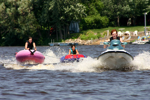 Tubing behind a jetski